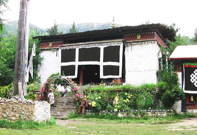 Main building of Tsozong Gongba Monastery